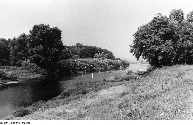 Original image description from the Deutsche FotothekCoswig-Kötitz. Nebenarm der Elbe mit Elbinsel bei der ehem. Schiffs- und Windmühle